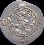 Pièce du règne de Hormizd IV